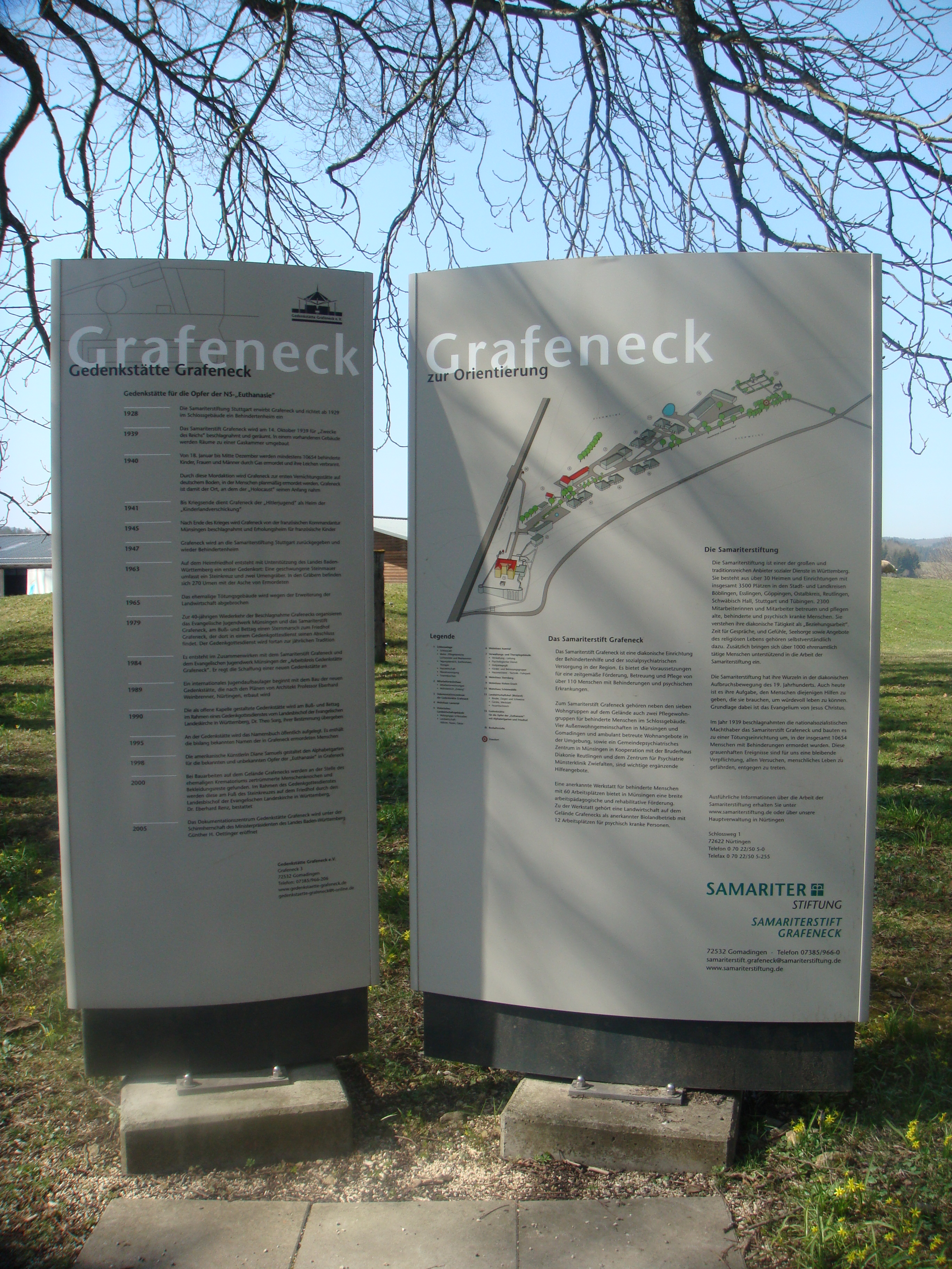 Grafeneck Lageplan